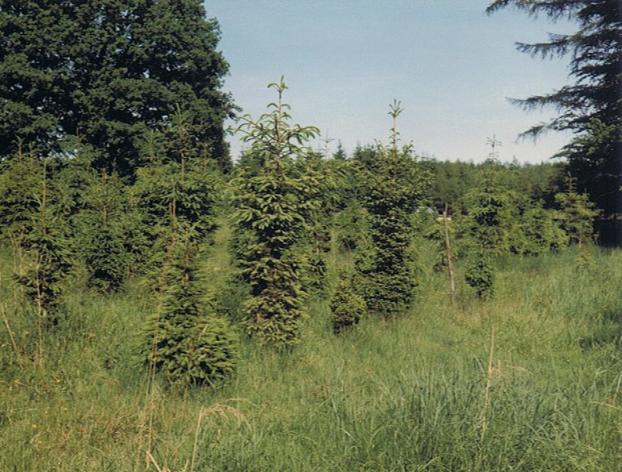 Wildverbiss